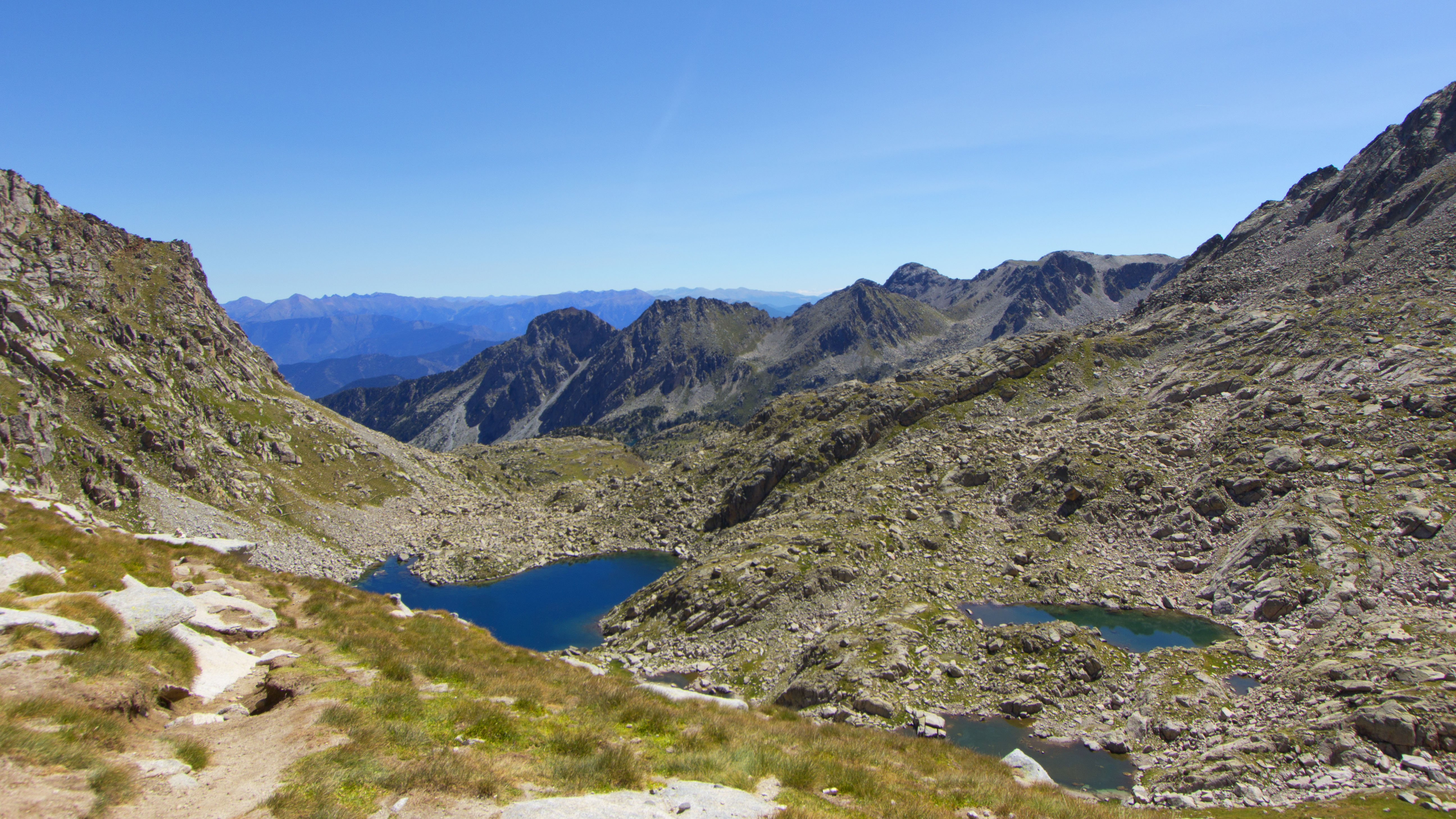 Estany Gran i estanys Petits de Peguera (Pallars Sobirà)